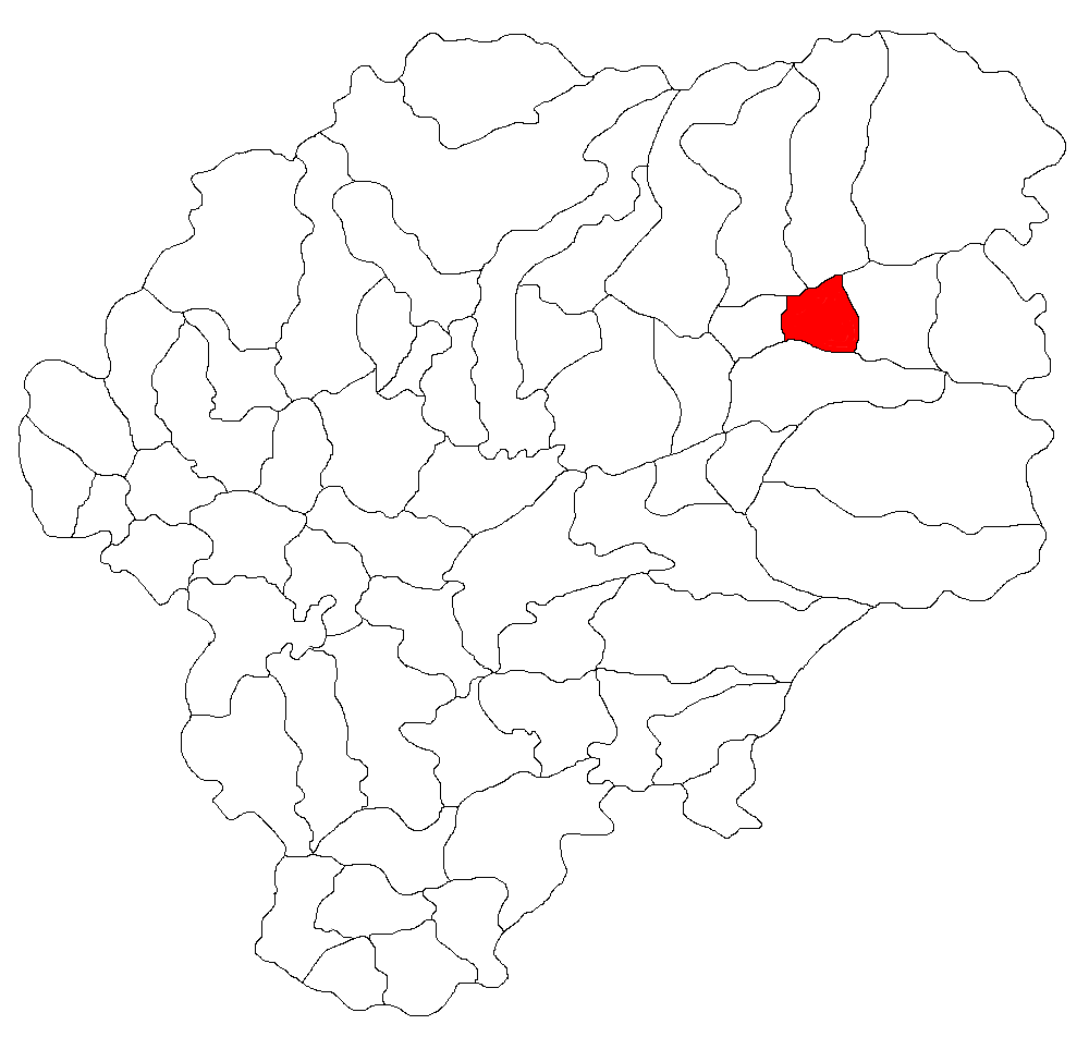 Categorie:Hărţi ale judeţului Bistriţa-Năsăud